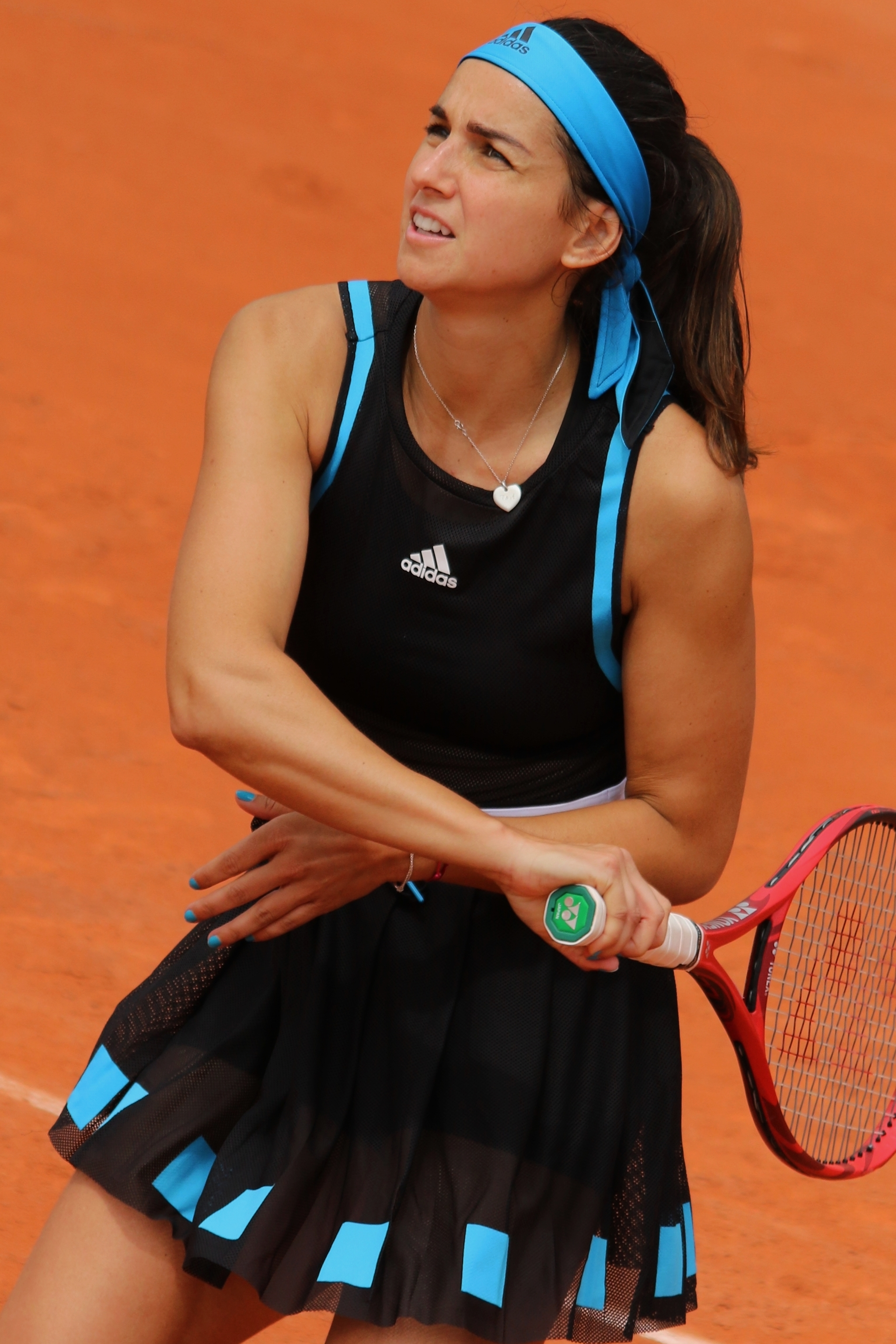 Hesse RG19 (3)